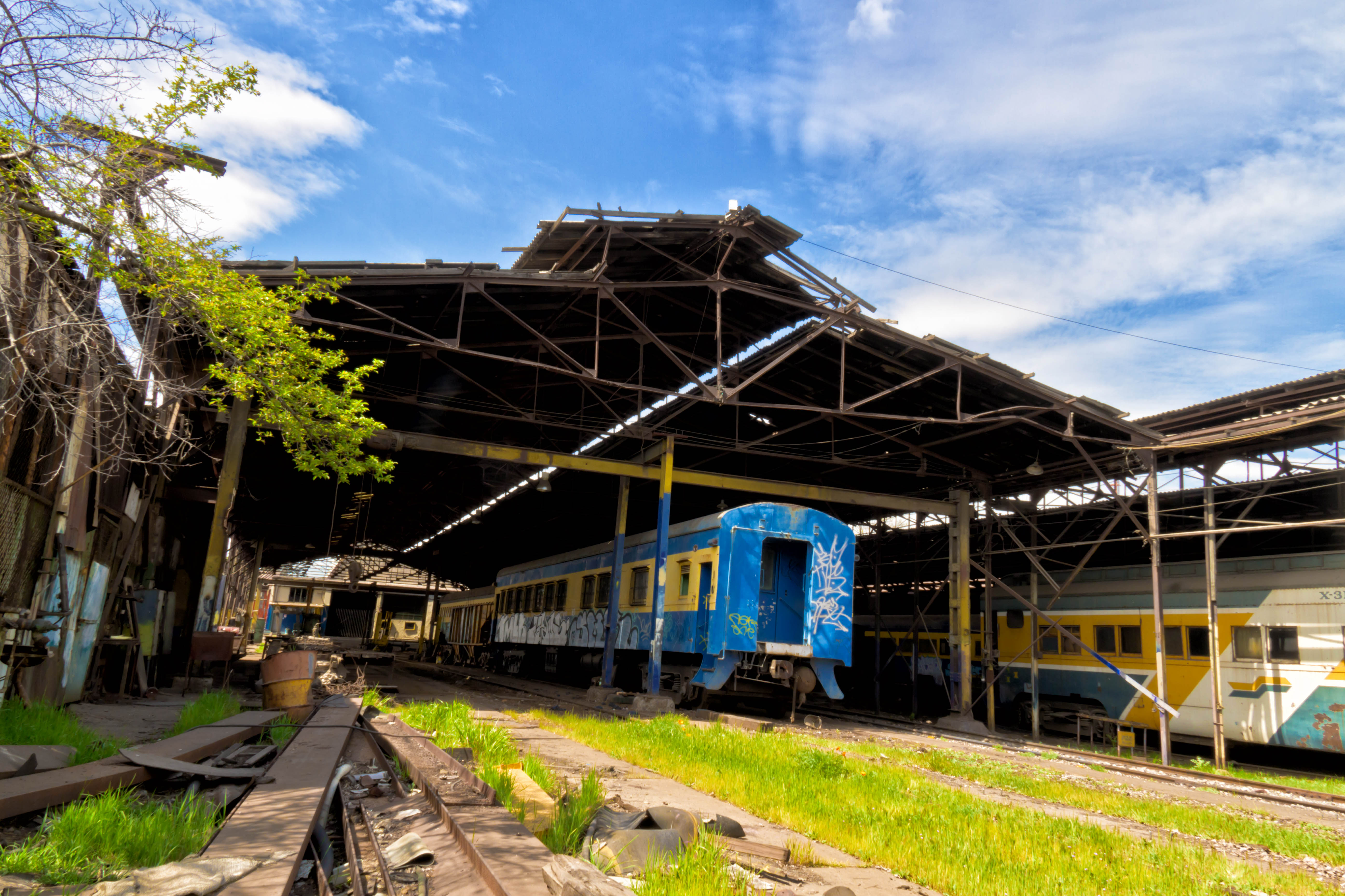 Maestranza de ferrocarriles San Eugenio y edificaciones anexas This is a photo of a national monument in Chile: 2009